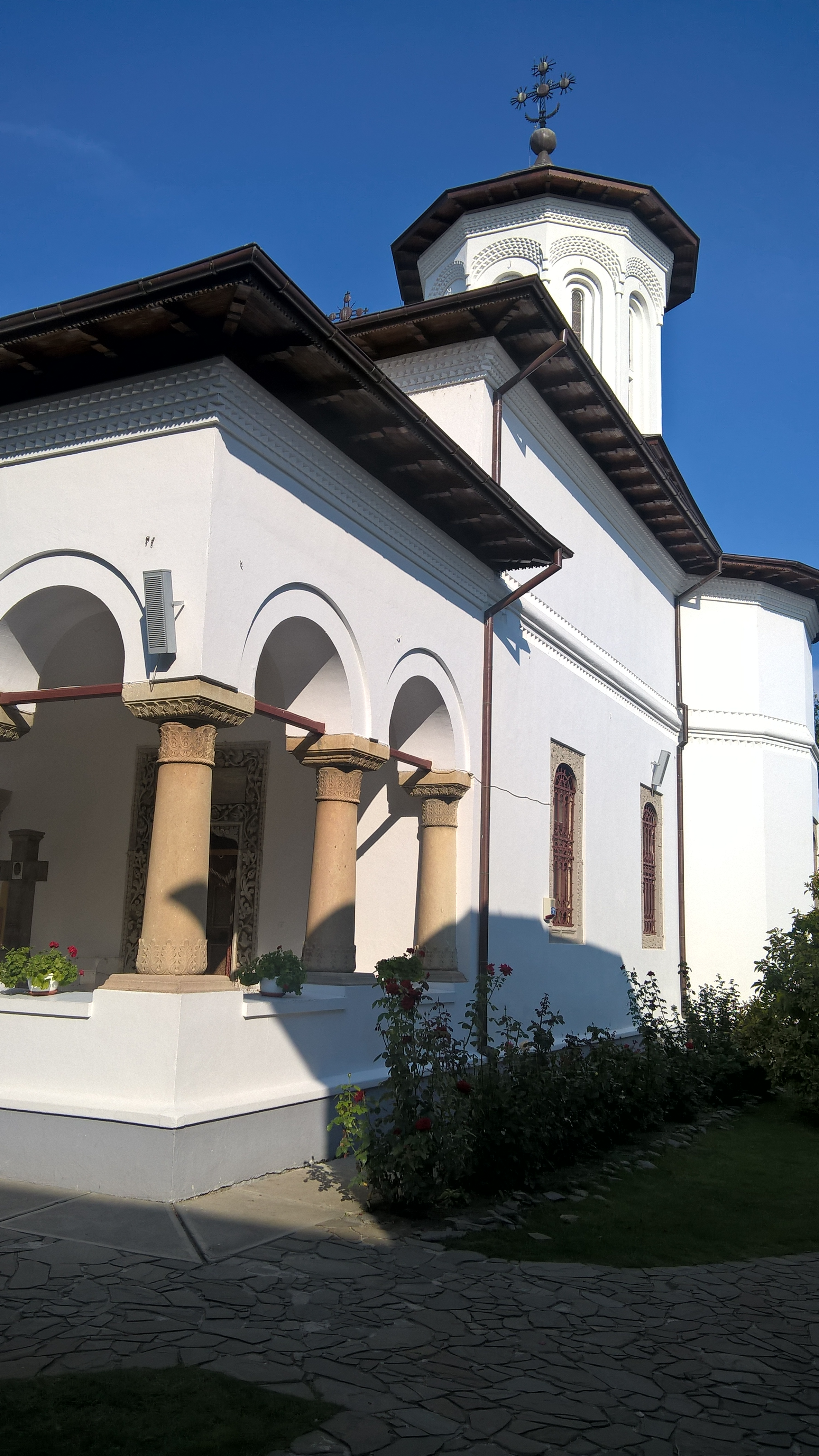 Mănăstirea Brâncoveni